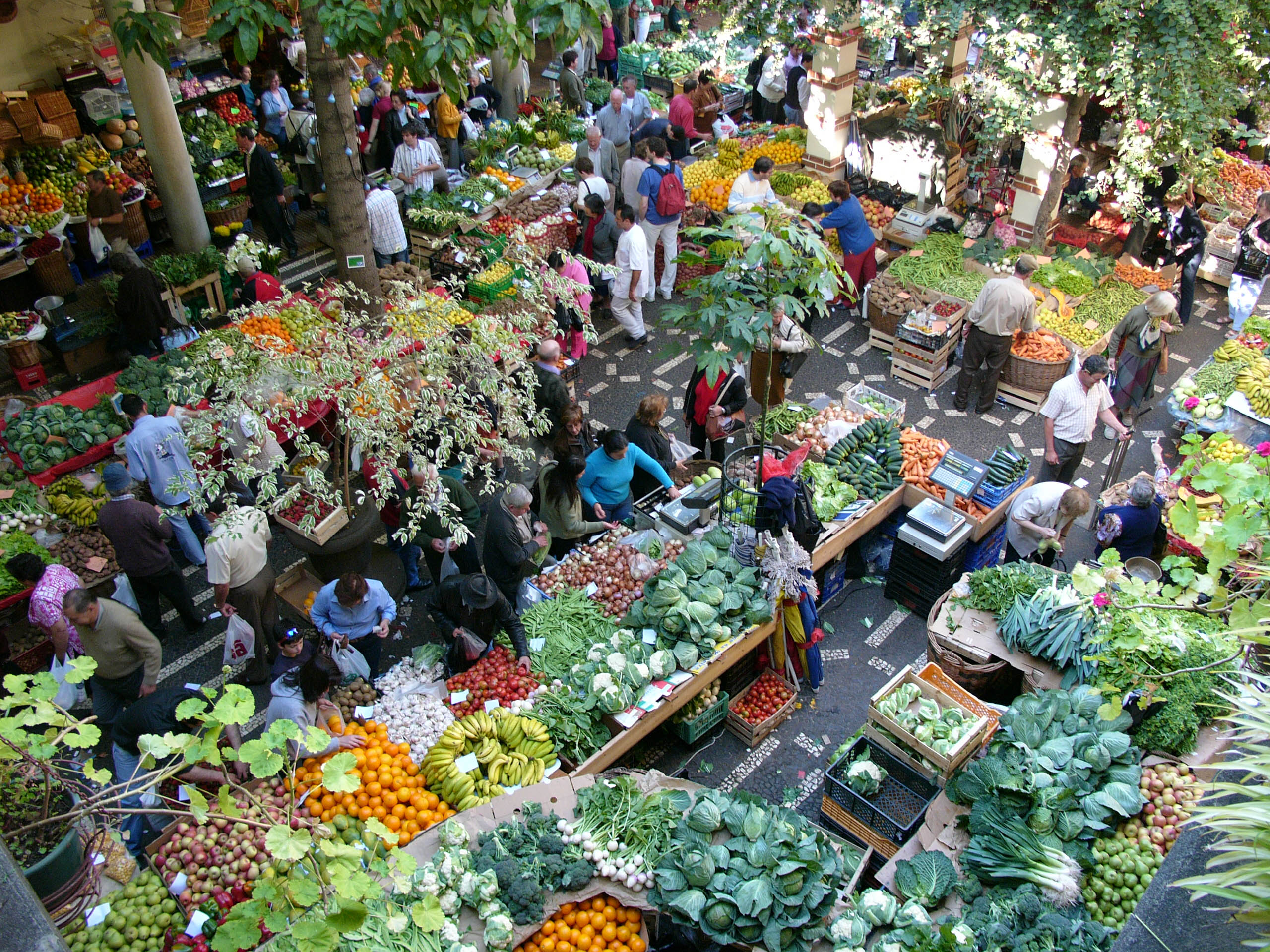 Market in Funchal, Madeira